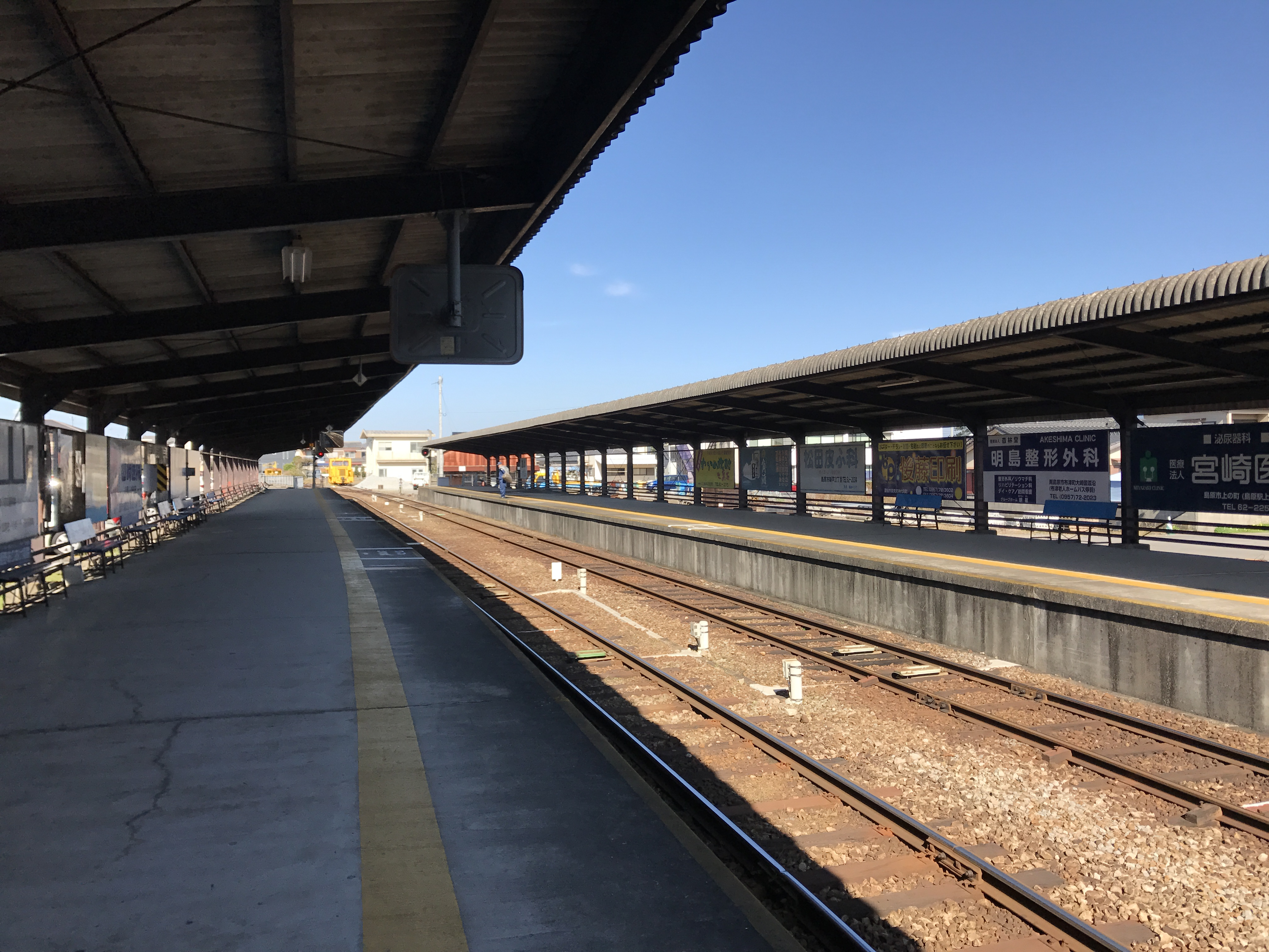 島原駅のホーム(奥は三会方面)